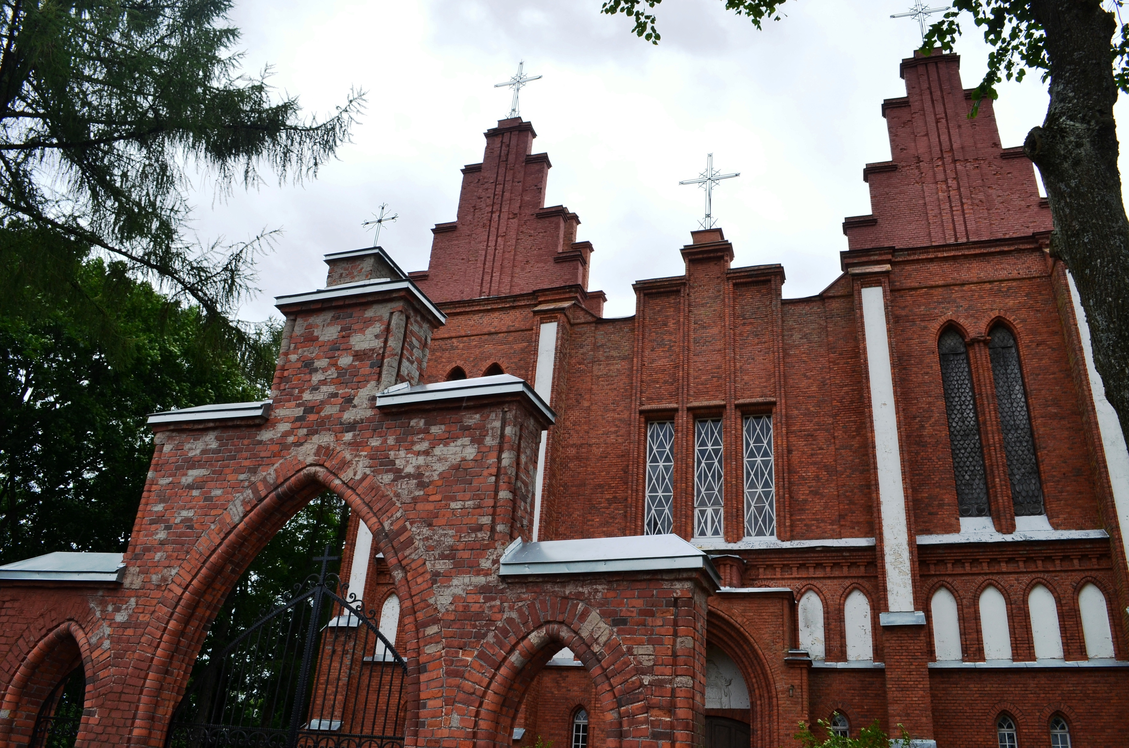 Paberžės bažnyčia, Vilniaus r.